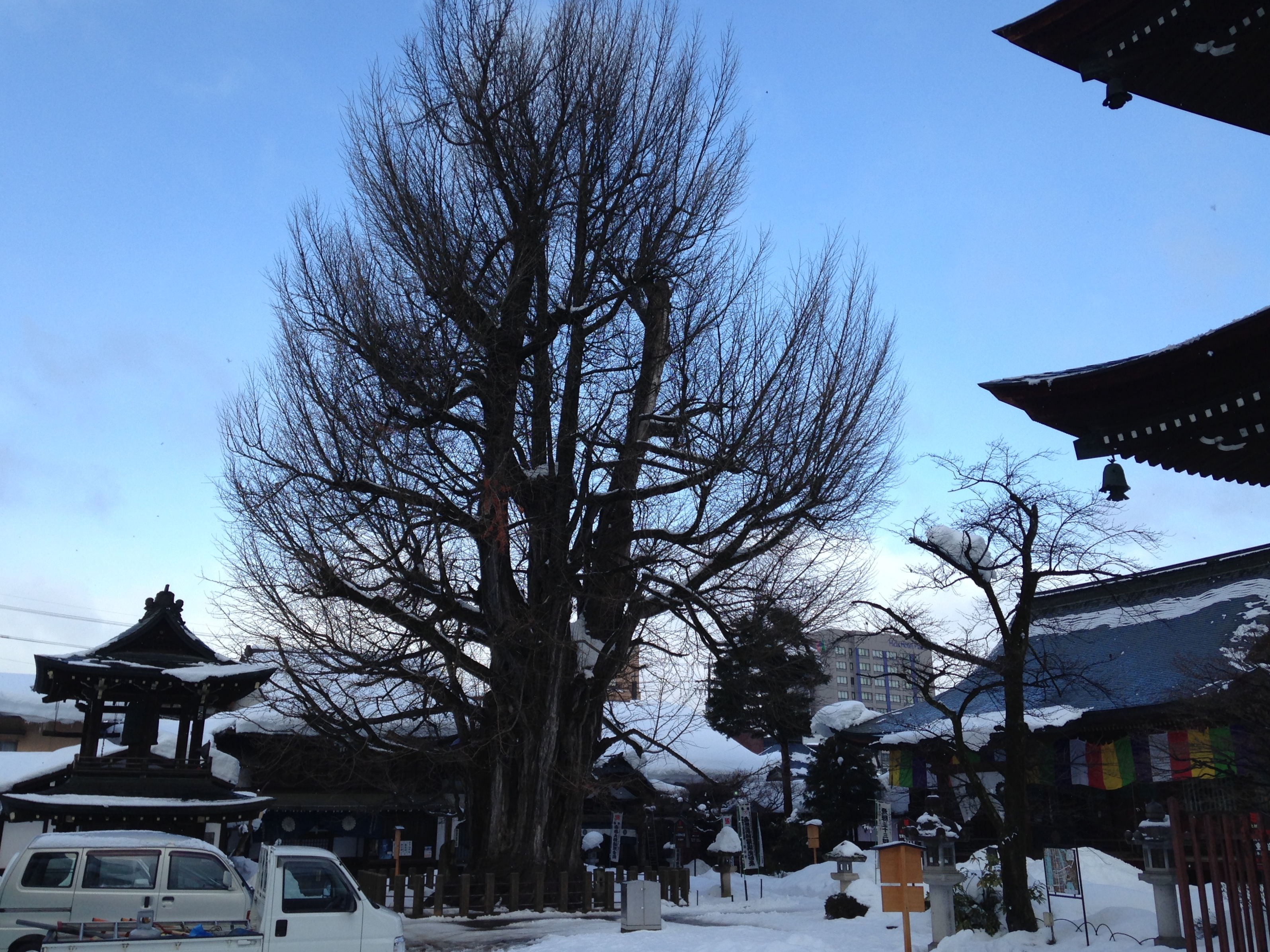 飛騨国分寺の大イチョウと本堂